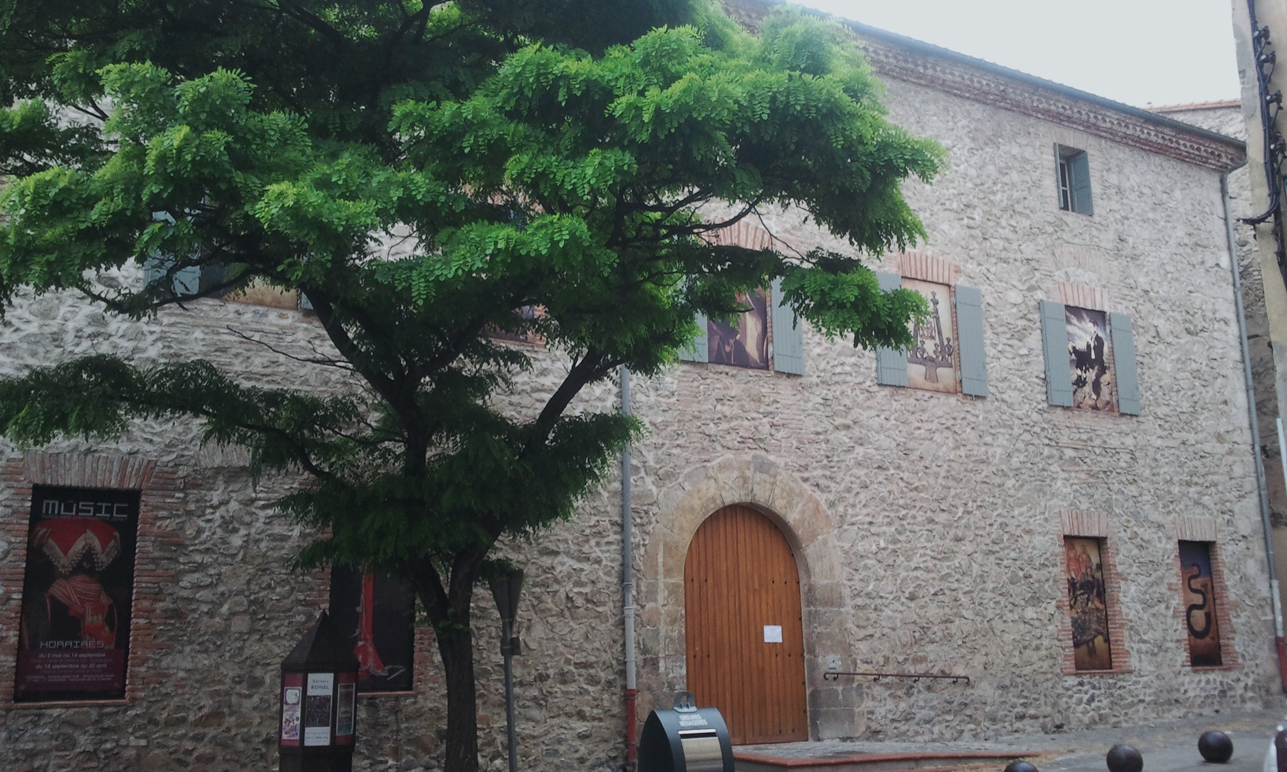 Façade du Musée des instruments de Céret